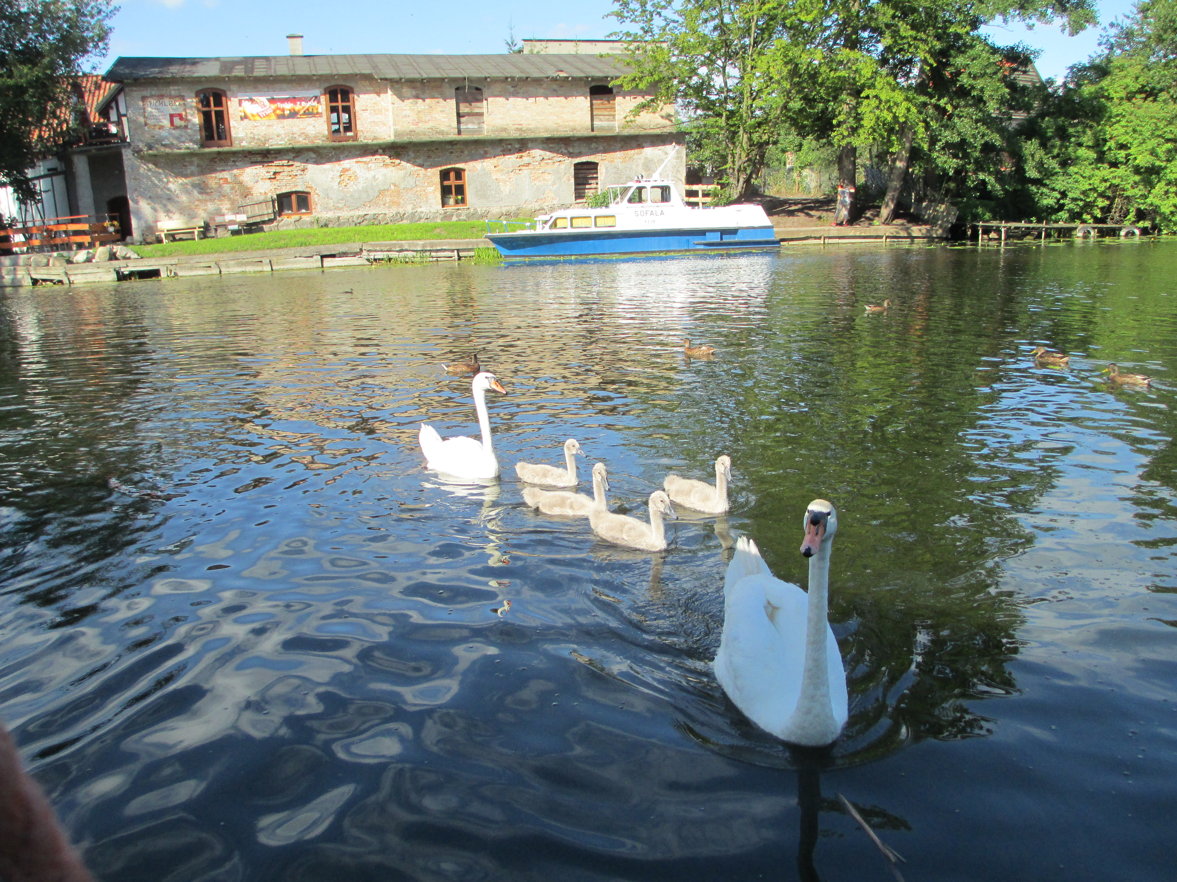 תעלת אלבלונג